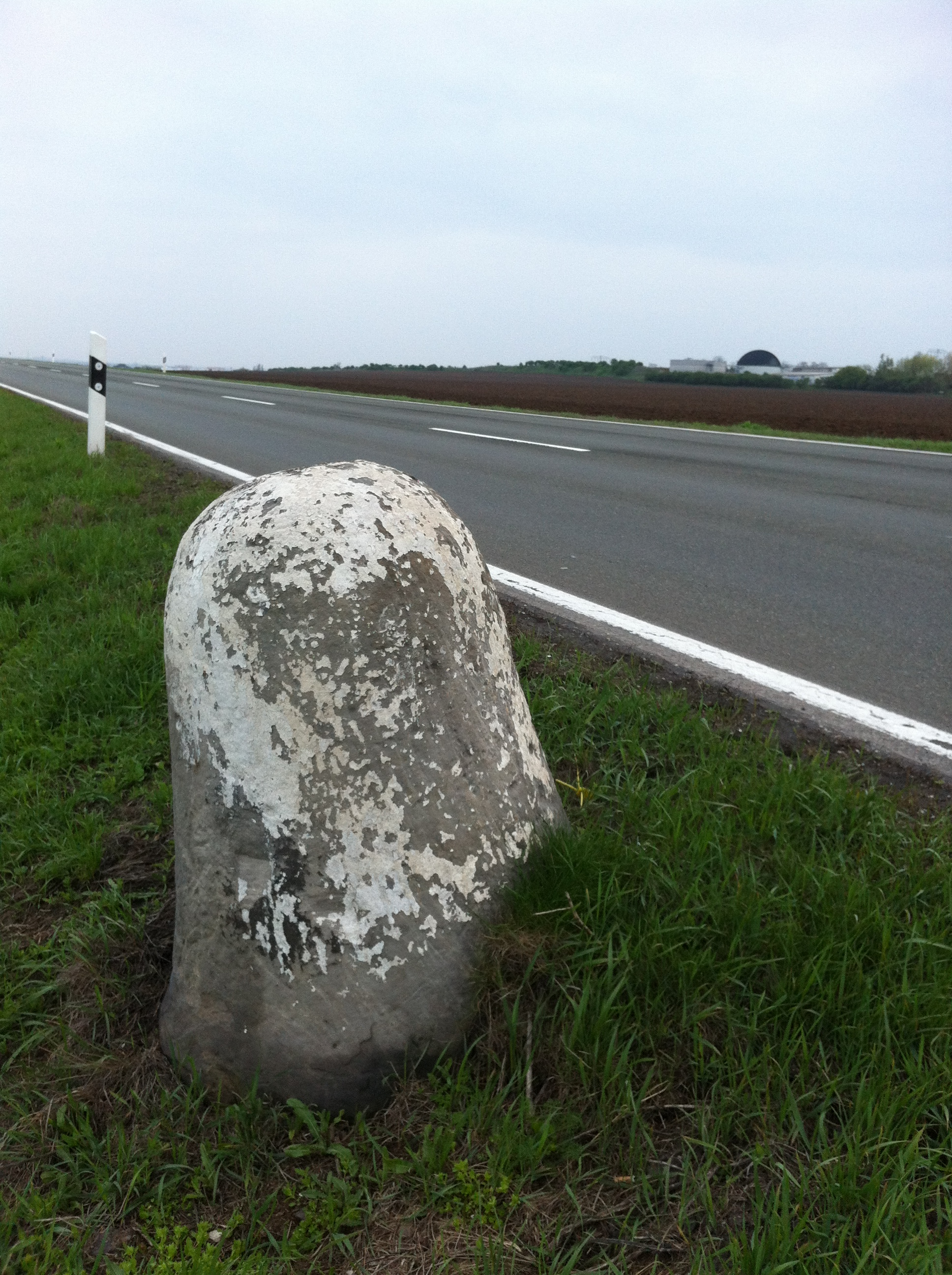 Preußischer Halbmeilenstein an der B91 bei Reichardtswerben